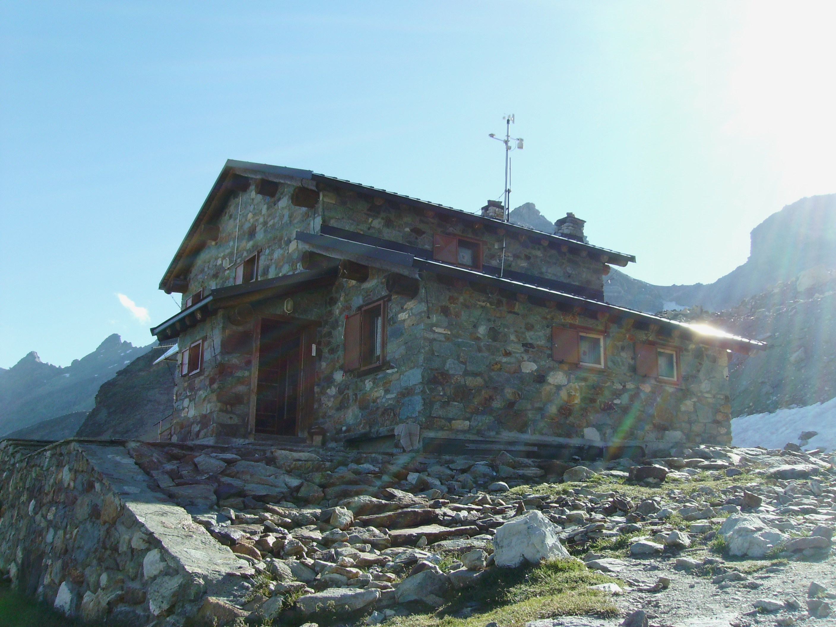 Il Rifugio Perucca-Vuillermoz